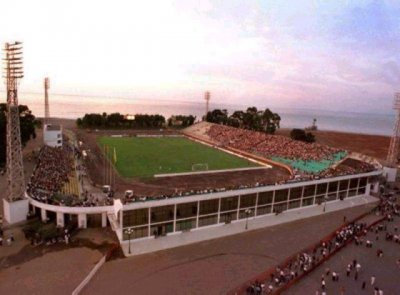 ბათუმის სტადიონის ფოტო-სურათი Built in 2006-2007, Stadioni Batumi